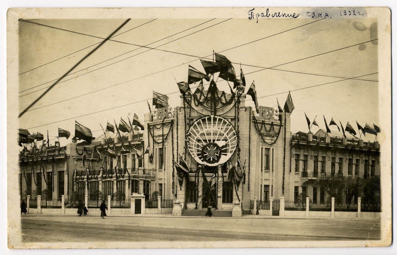 哈尔滨中东铁路大楼